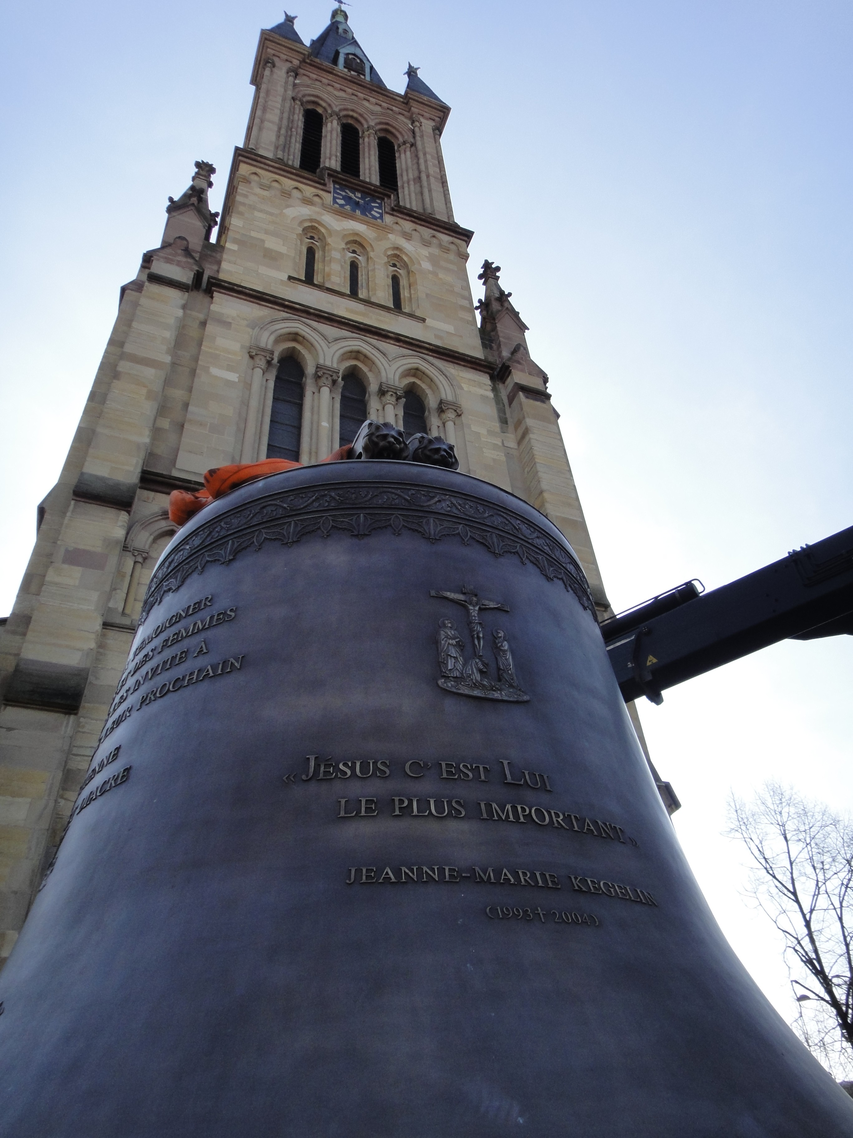 photo d'une des faces de la cloche de l'église St Etienne de Mulhouse.